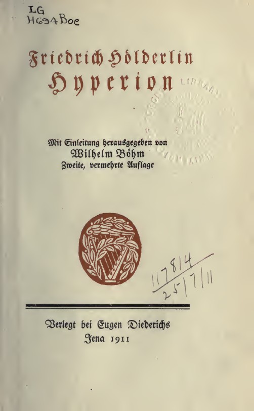 1: Hyperion / Friedrich Holderlin ; mit Einleitung herausgegeben von Wilhelm Bohm. Jena : Eugen Diederichs, 1911. - CXIX, 331 p., [2] c. di tav. : ill. . Frontespizio